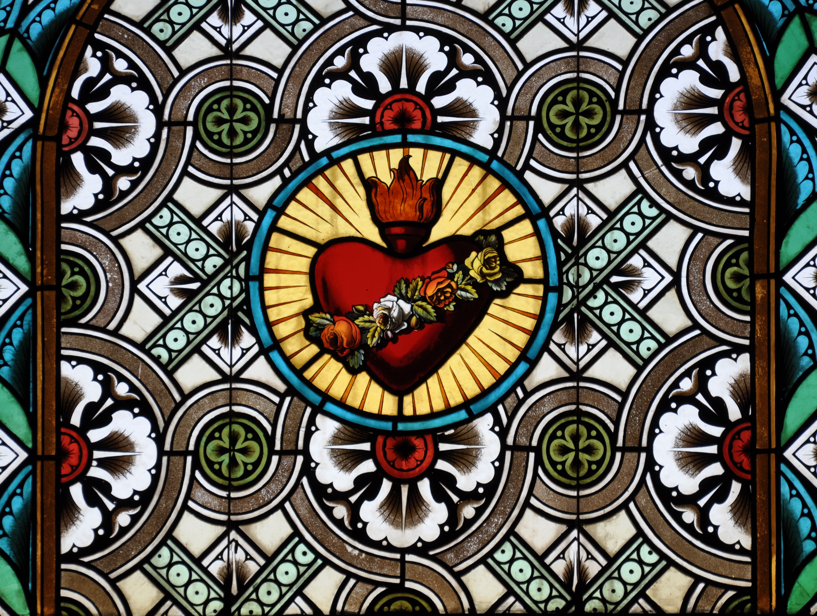 Kloster Mehrerau, Bregenz, Vorarlberg; Collegiumskapelle; Glasfenster von Geyling (Wien), 1886, linke Seite, 6. Fenster von vorn: Herz Mariens (?)